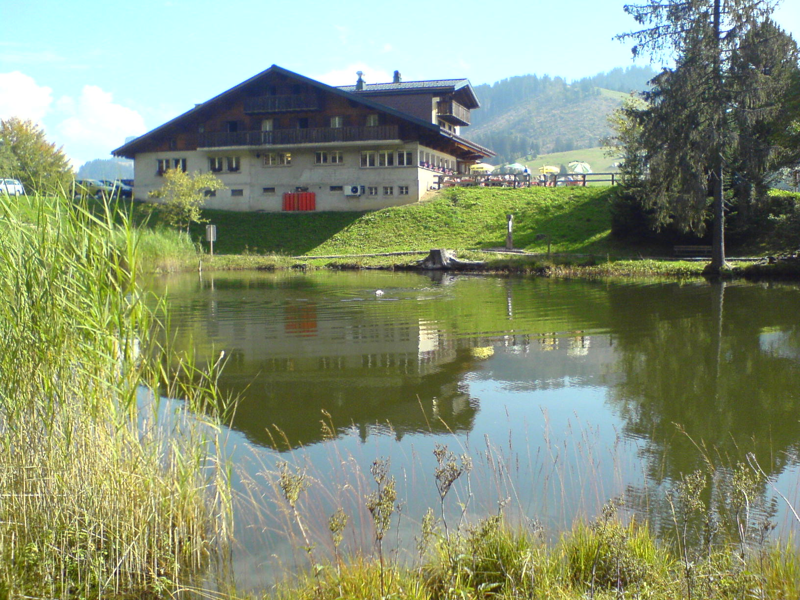 Vue du lac des Joncs depuis sa berge ouest